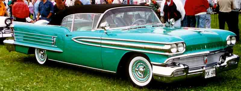 1958 Oldsmobile 98 Convertible